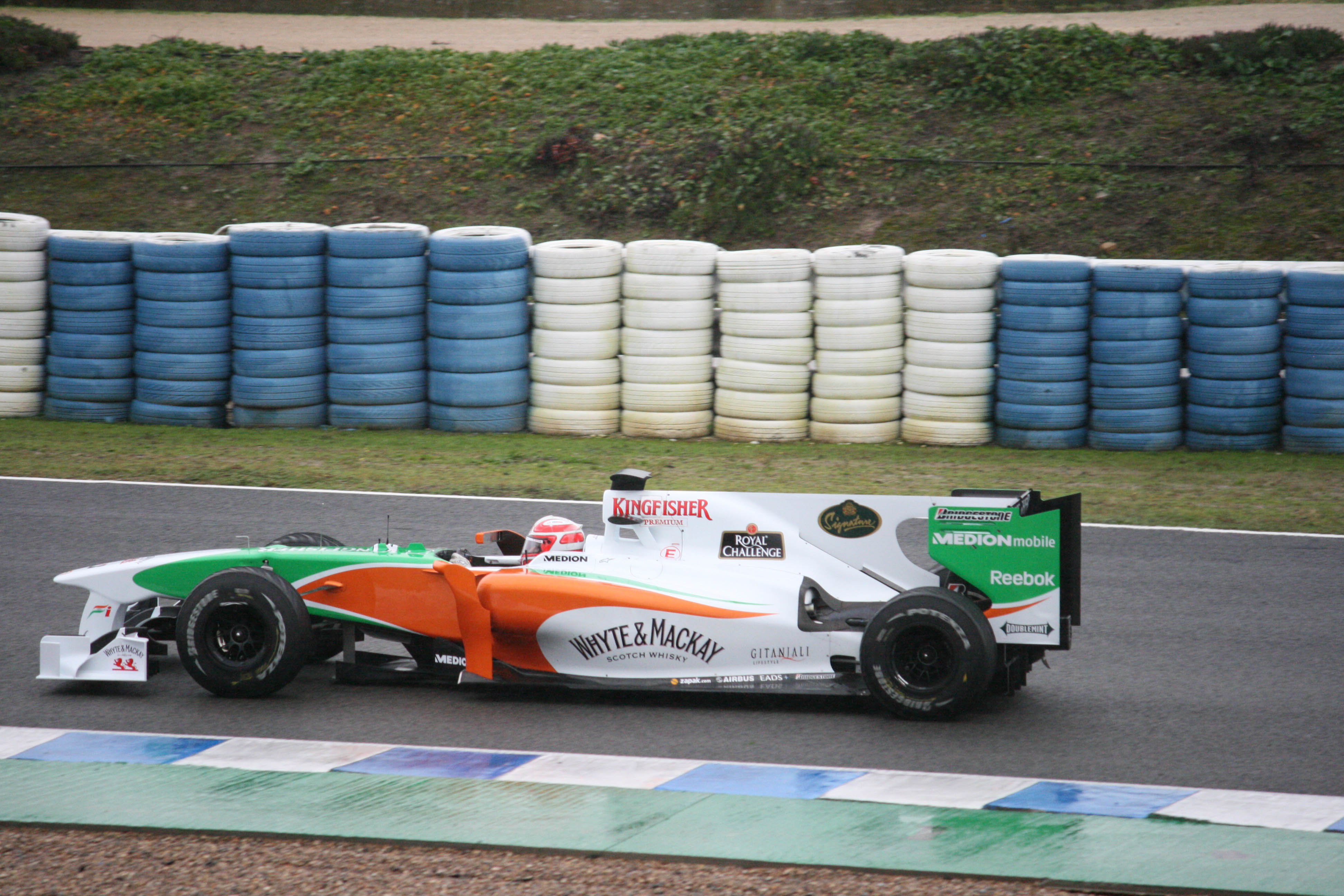 Vitantonio Liuzzi testing for Force India at Jerez, 10/02/2010.